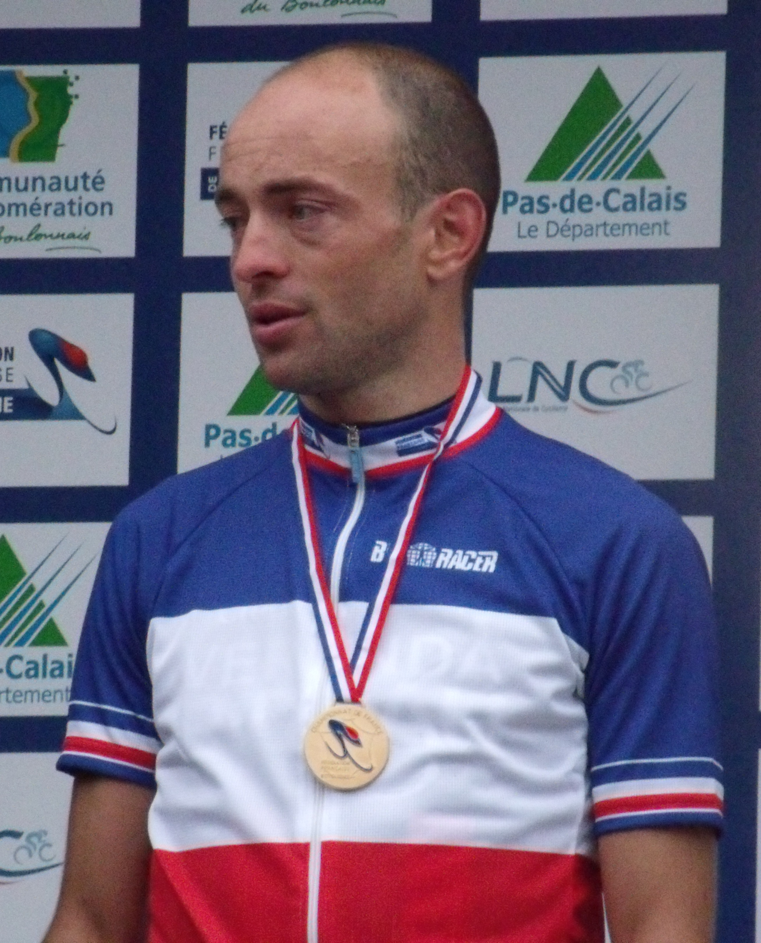 Freddy Bichot sur le podium du championnat de France 2011